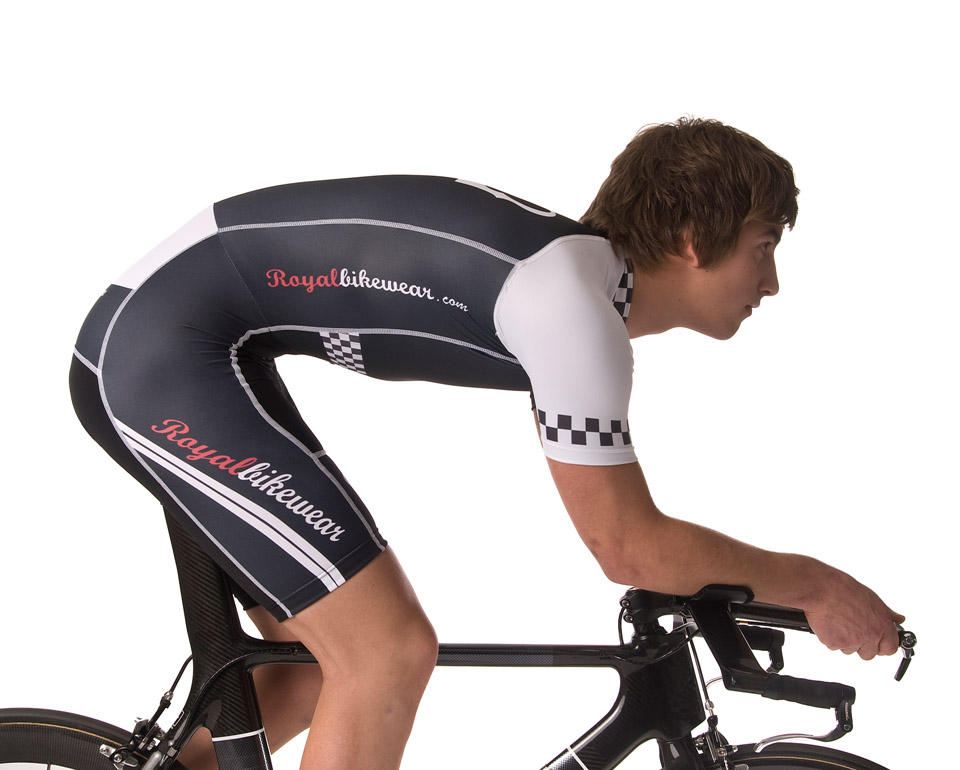 Zeitfahranzug